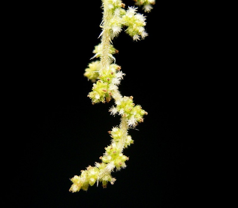 Urtica dioica